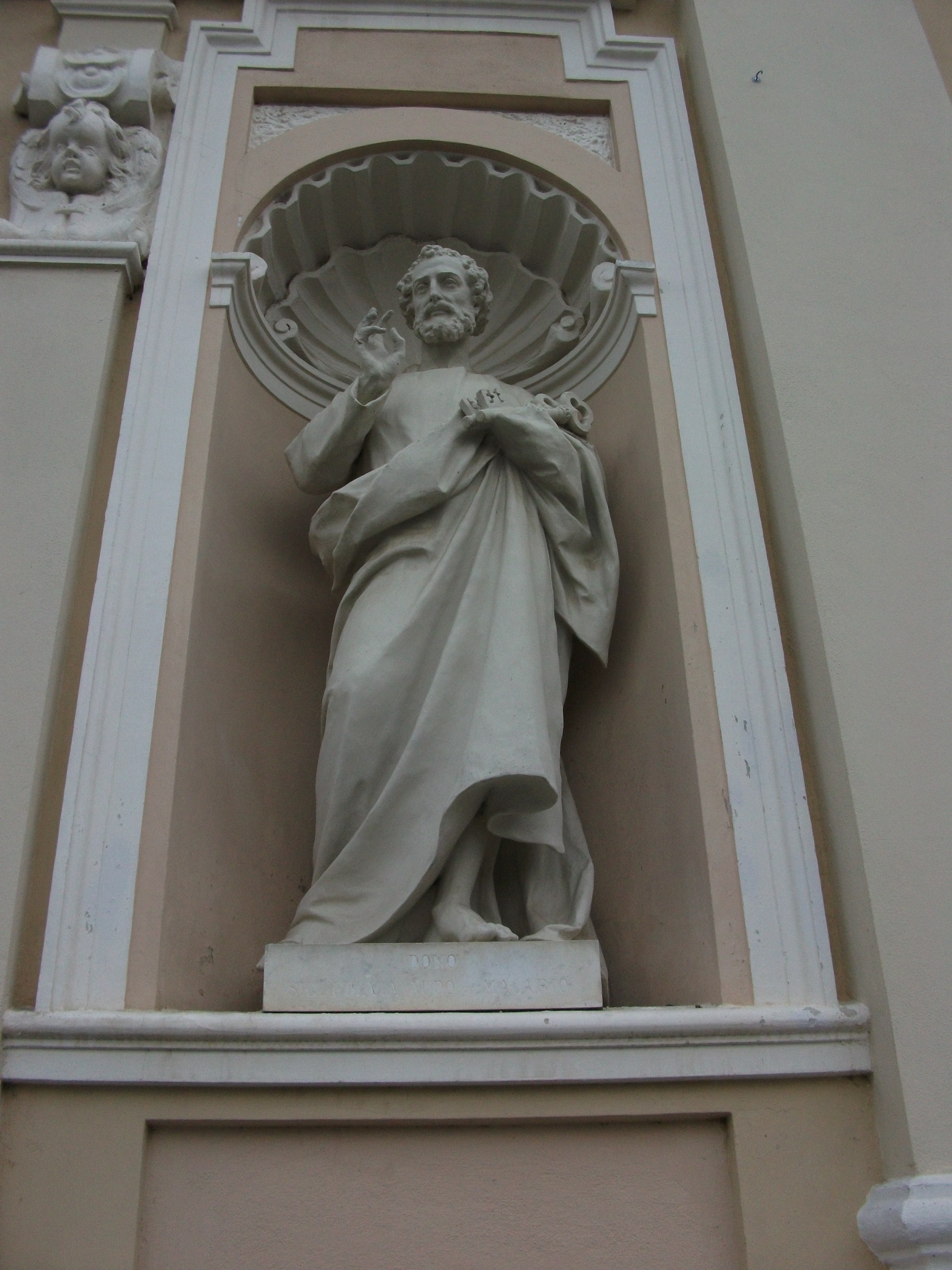 Statua di san Pietro sulla facciata della chiesa a Barbania